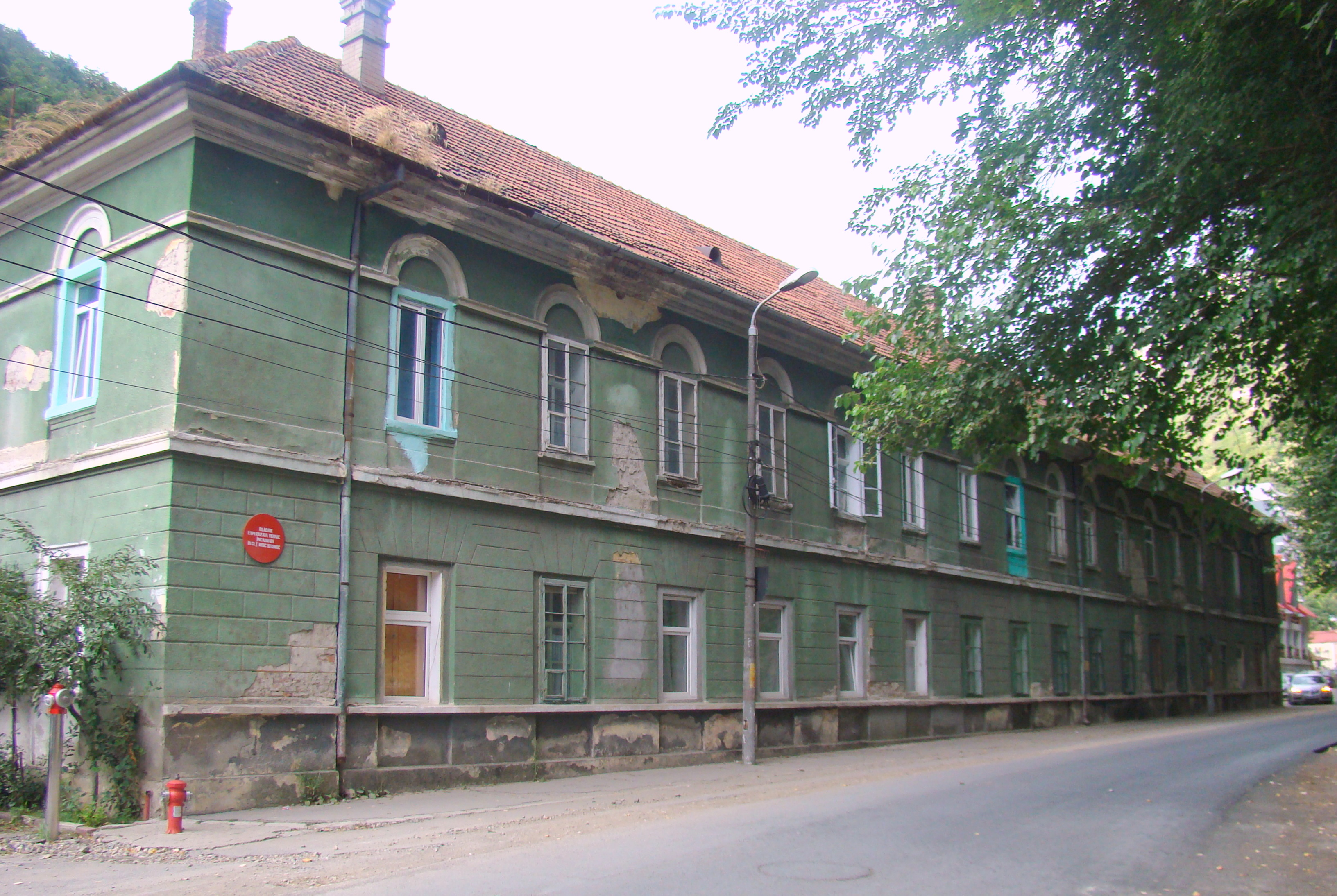 Vila Săracilor, azi locuințe, oraș Băile Herculane, Str. Castanilor 33 C în curtea pavilionului nr. 7